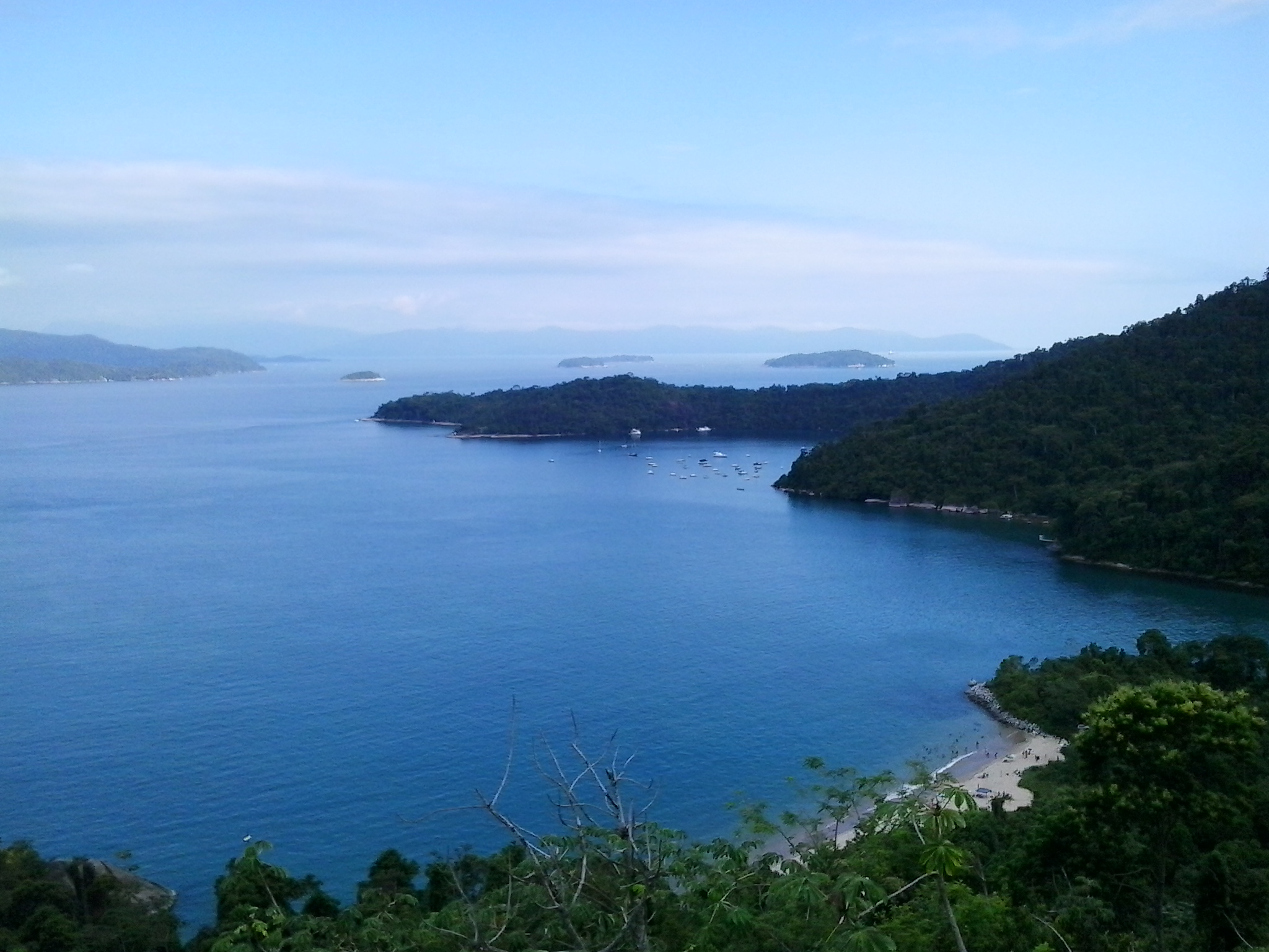 Praia do Laboratório, Angra dos Reis - RJ